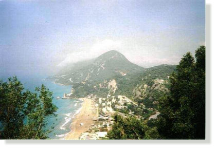 Afbeelding gekopieerd vanaf Wikipedia-de. De beschrijving daar was: Bild Korfu 2000 von Bodo Wiska, eigene Aufnahme von Strand von Glyfada, nachbearbeitet 2003 für WIKI Bo 03:06, 26. Jul 2003 (CEST)